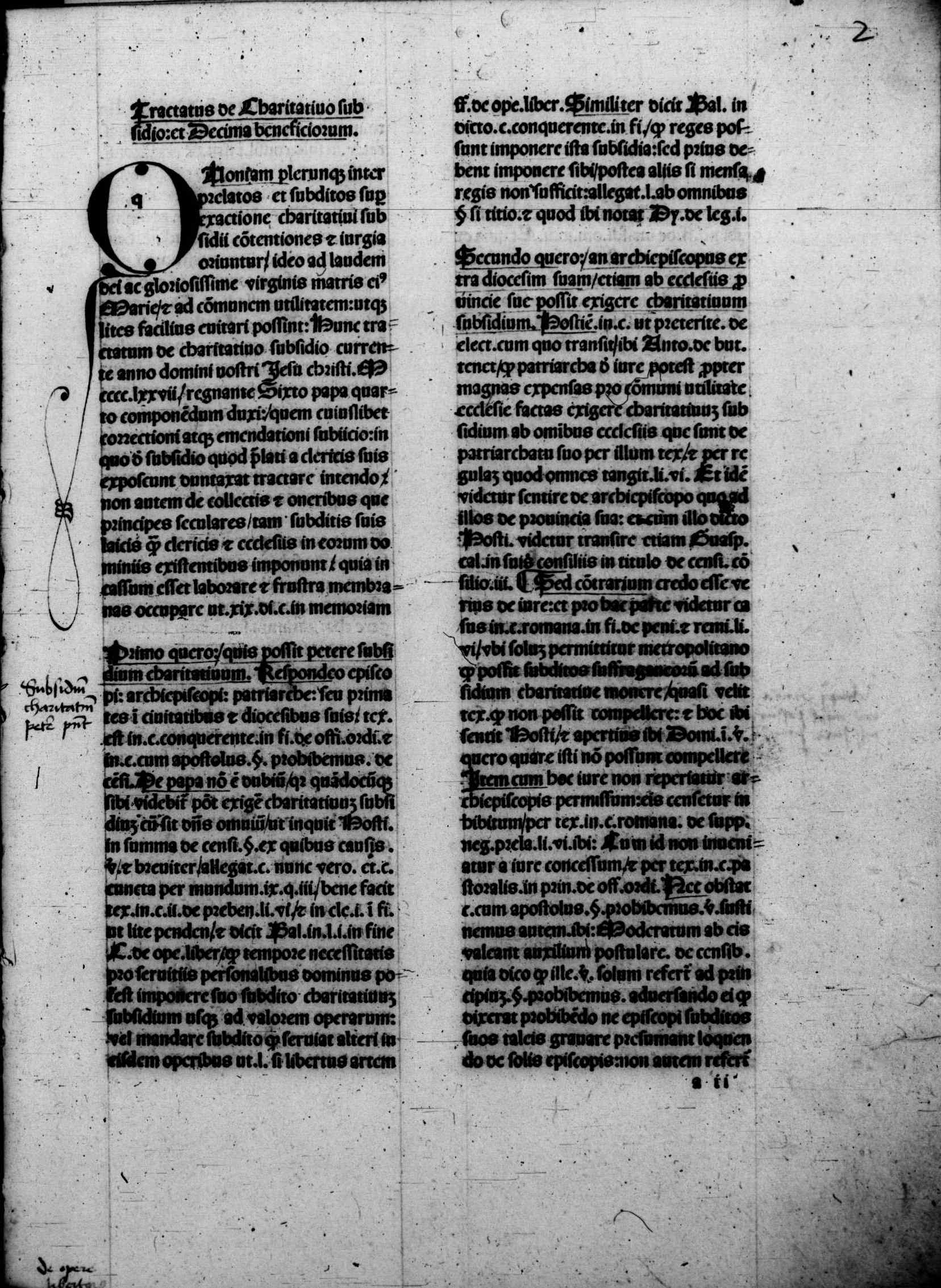 Carta a2r